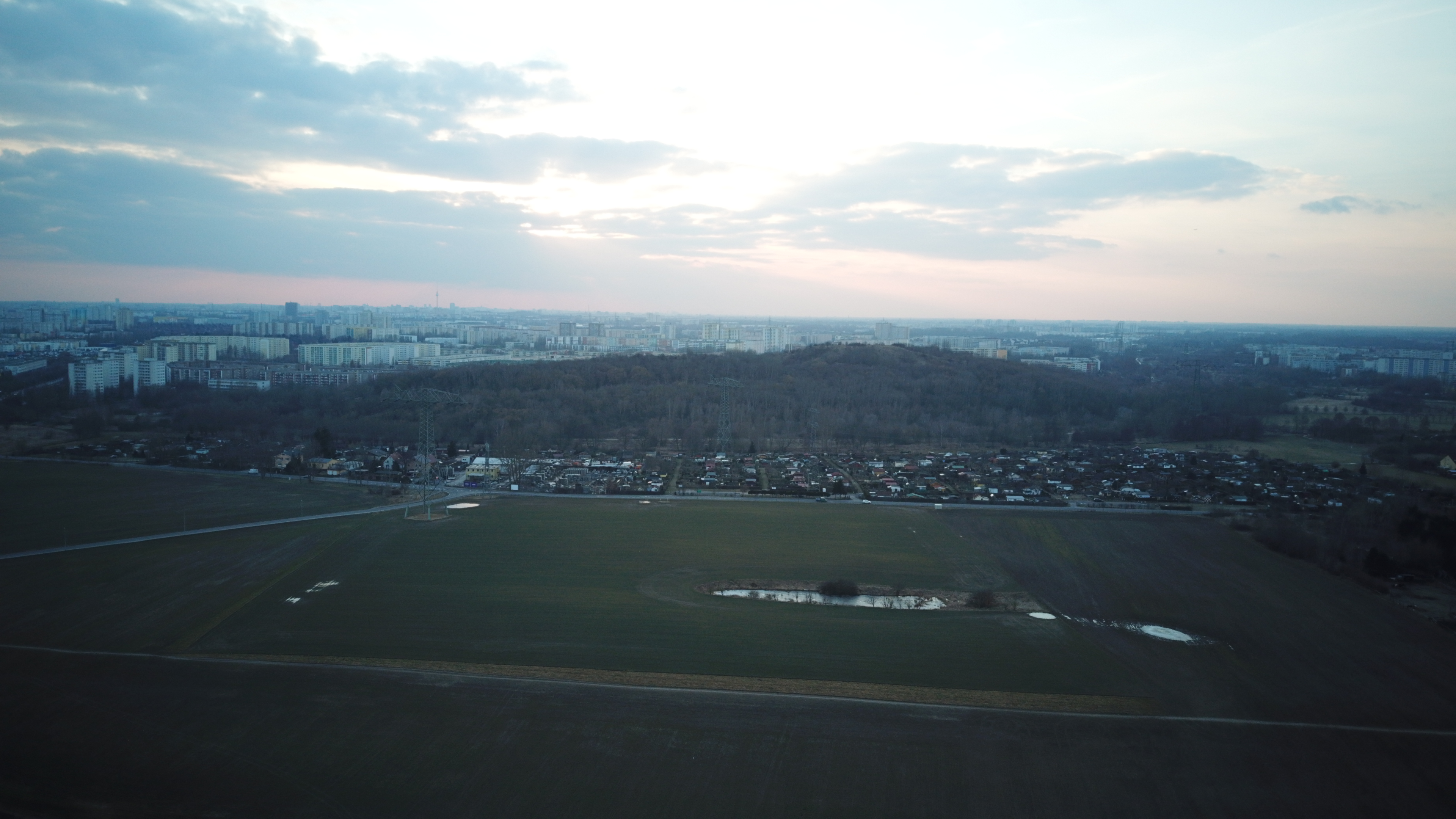 Ahrensfelder Berge von oben